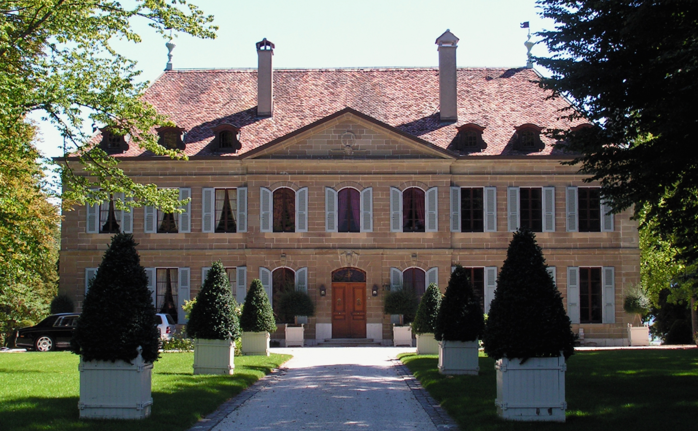 Route du Crêt-de-Choully 30, Satigny. Château de Choully.